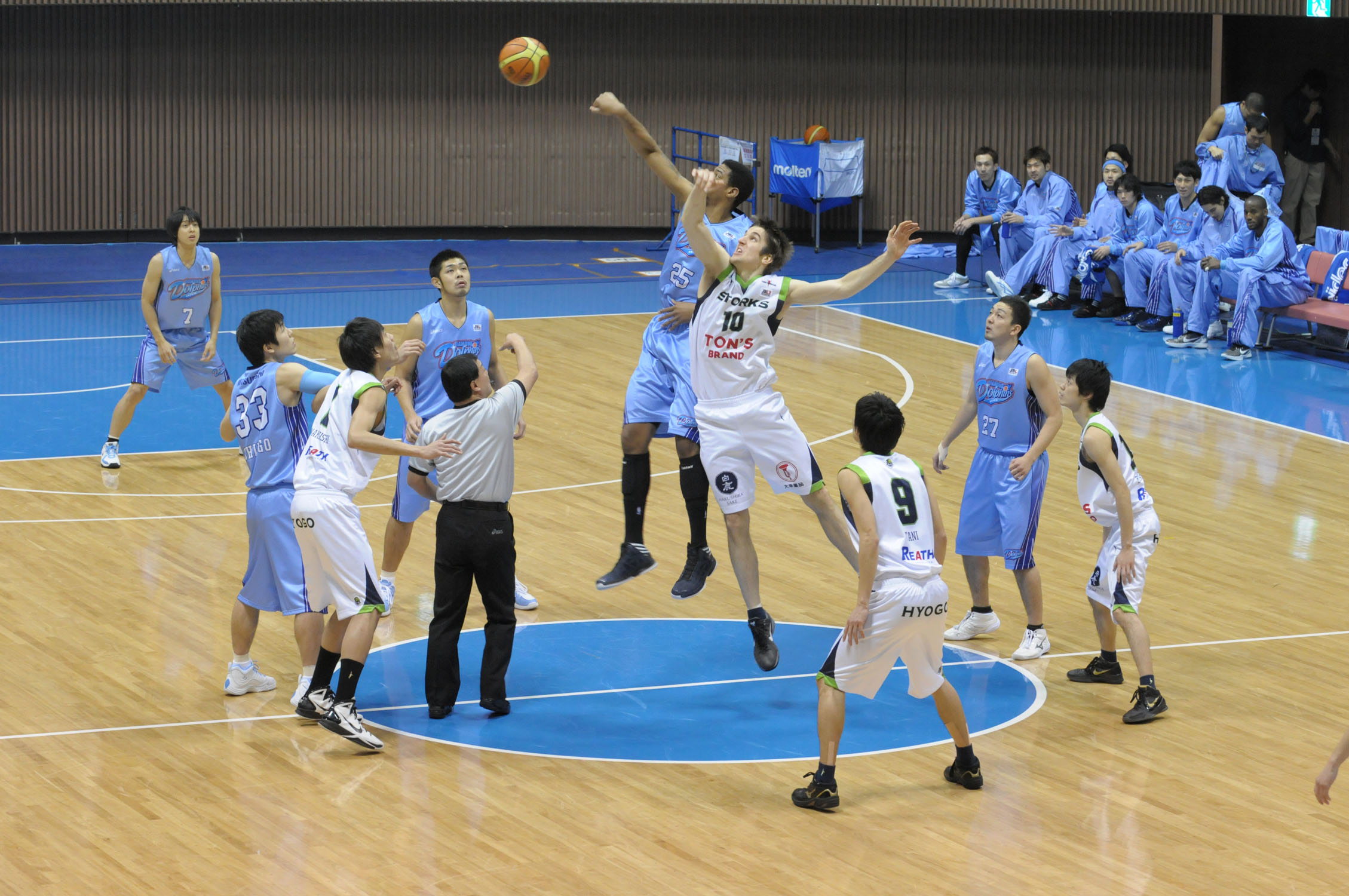 2013年全日本総合バスケットボール選手権大会3回戦、兵庫ストークス対三菱電機ダイヤモンドドルフィンズ。代々木第二体育館で。